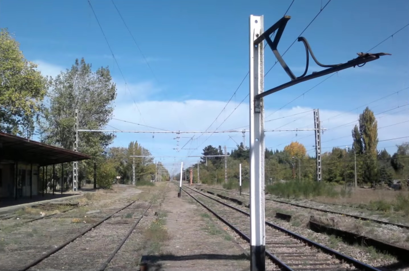 Estación Monte Águila, fue cabecera del ramal Monte Águila - Polcura, hoy se encuentra en desuso.